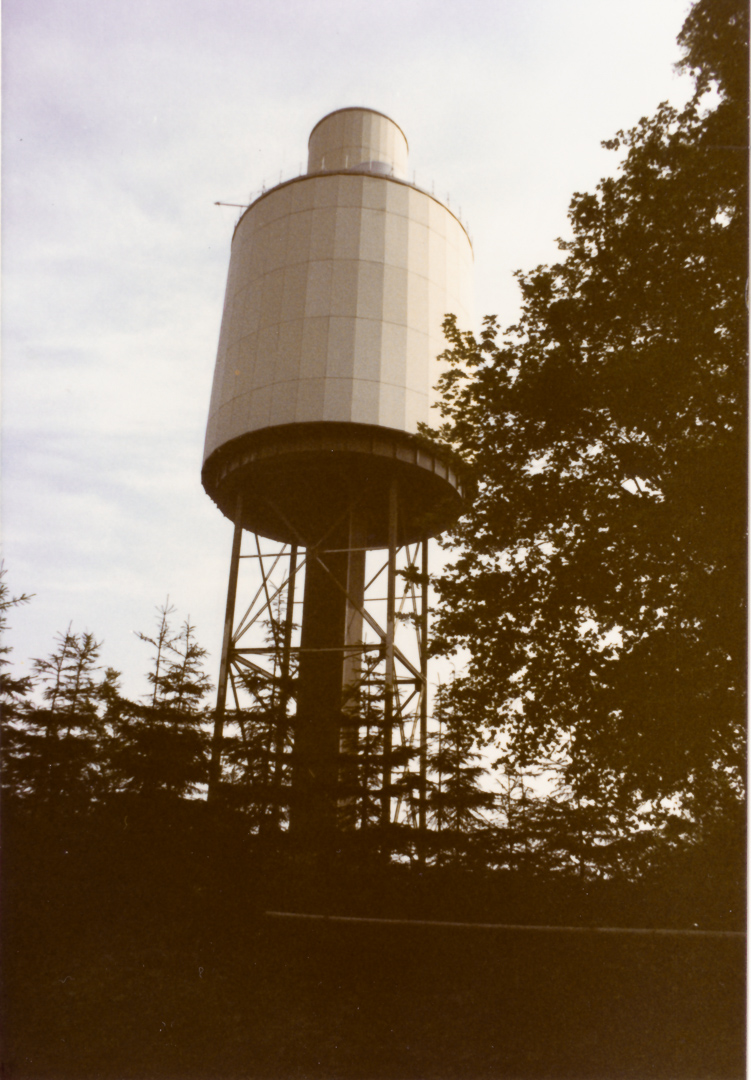 Ehemalige Abhöranlage des Bundesnachrichtendiensts auf dem Hohen Meißner (Jahr 1981)